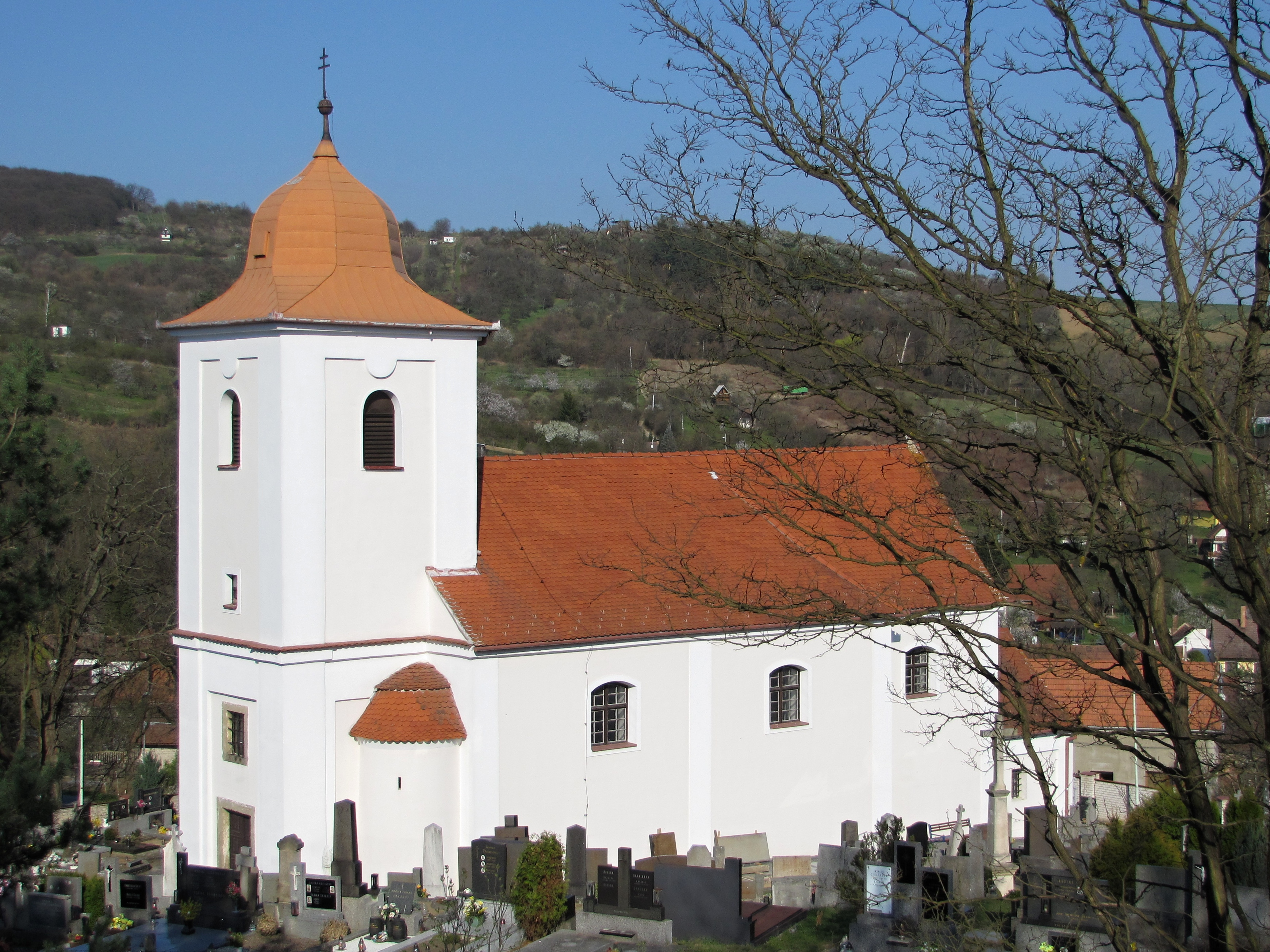 Kostel svatého Filipa a Jakuba v Bohuslavicích u Kyjova